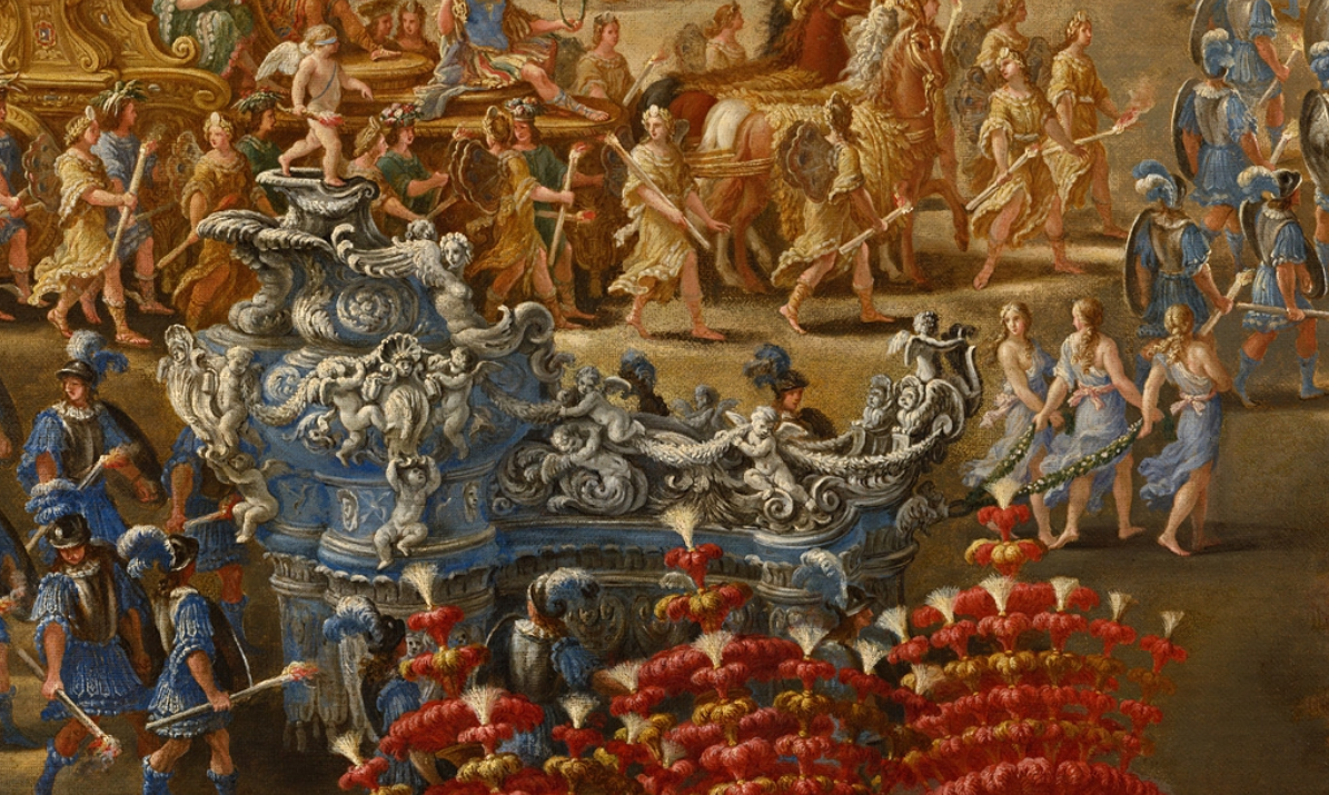 Carro di Amore - Dettaglio del dipinto La Giostra dei Caroselli, opera che raffigura la sfarzosa parata allegorica organizzata a Palazzo Barberini, durante il carnevale del 1656, in onore di Cristina di Svezia da poco giunta a Roma dopo l'abdicazione dal trono svedese